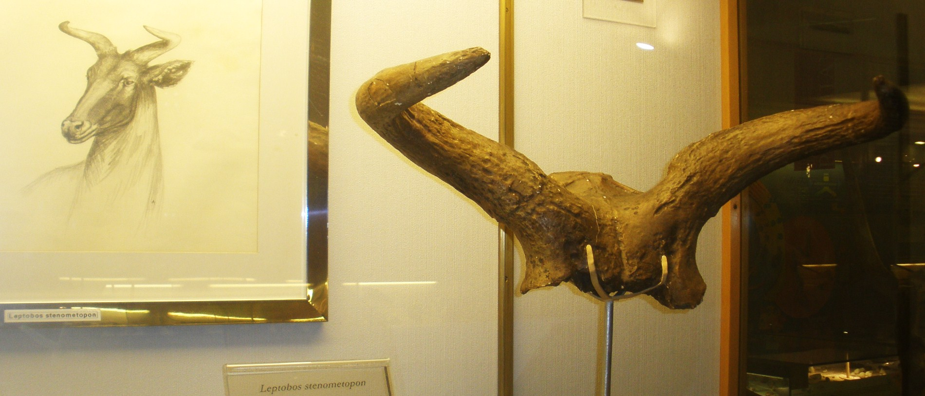 Fossil of Leptobos, an extinct mammal- Took the picture at Museo di Paleontologia di Firenze